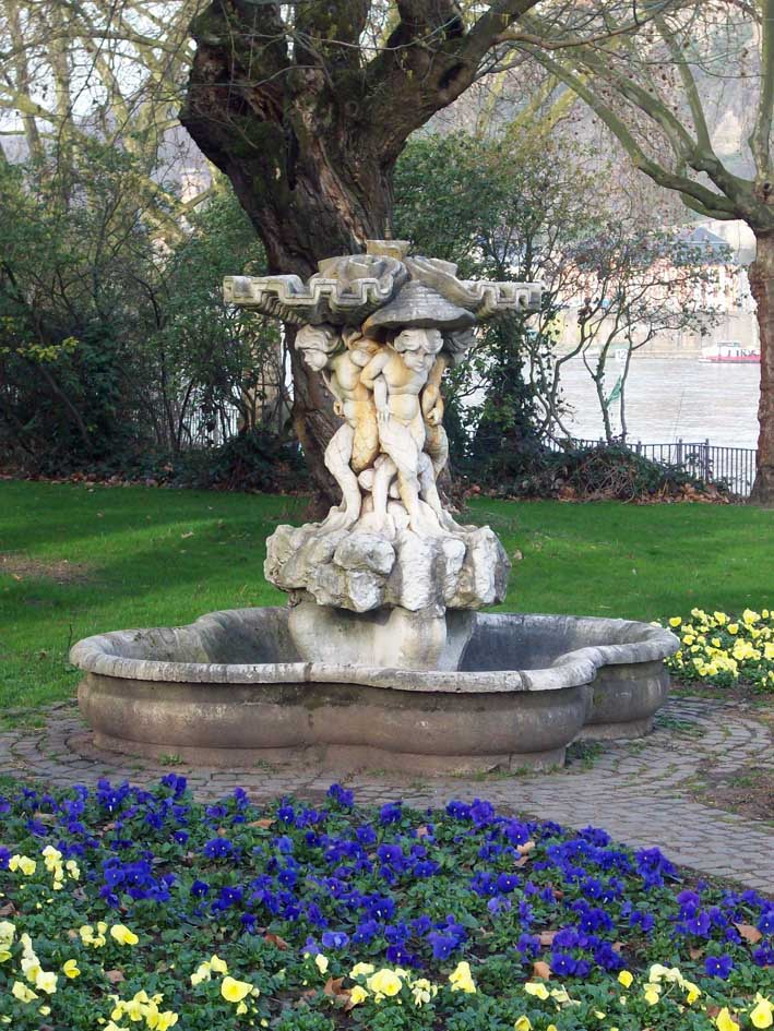 Muschelbrunnen an seinem jetzigen Standort in den Rheinanlagen.